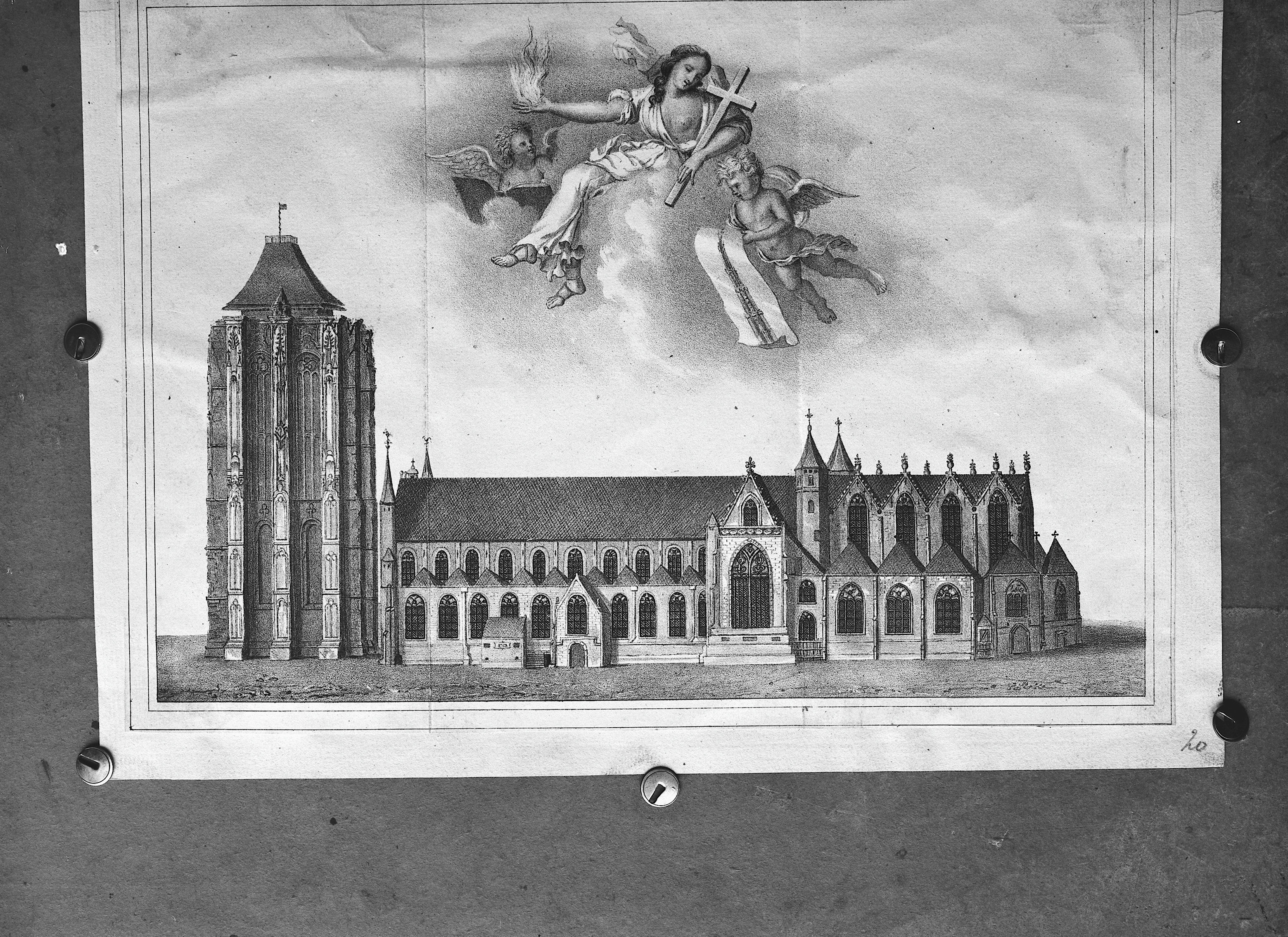 Stadhuis: Archief, de afgebrande Monstertoren (uitgegeven door Mr.J.Berman 1834) (opmerking: Fotonummer 9225)